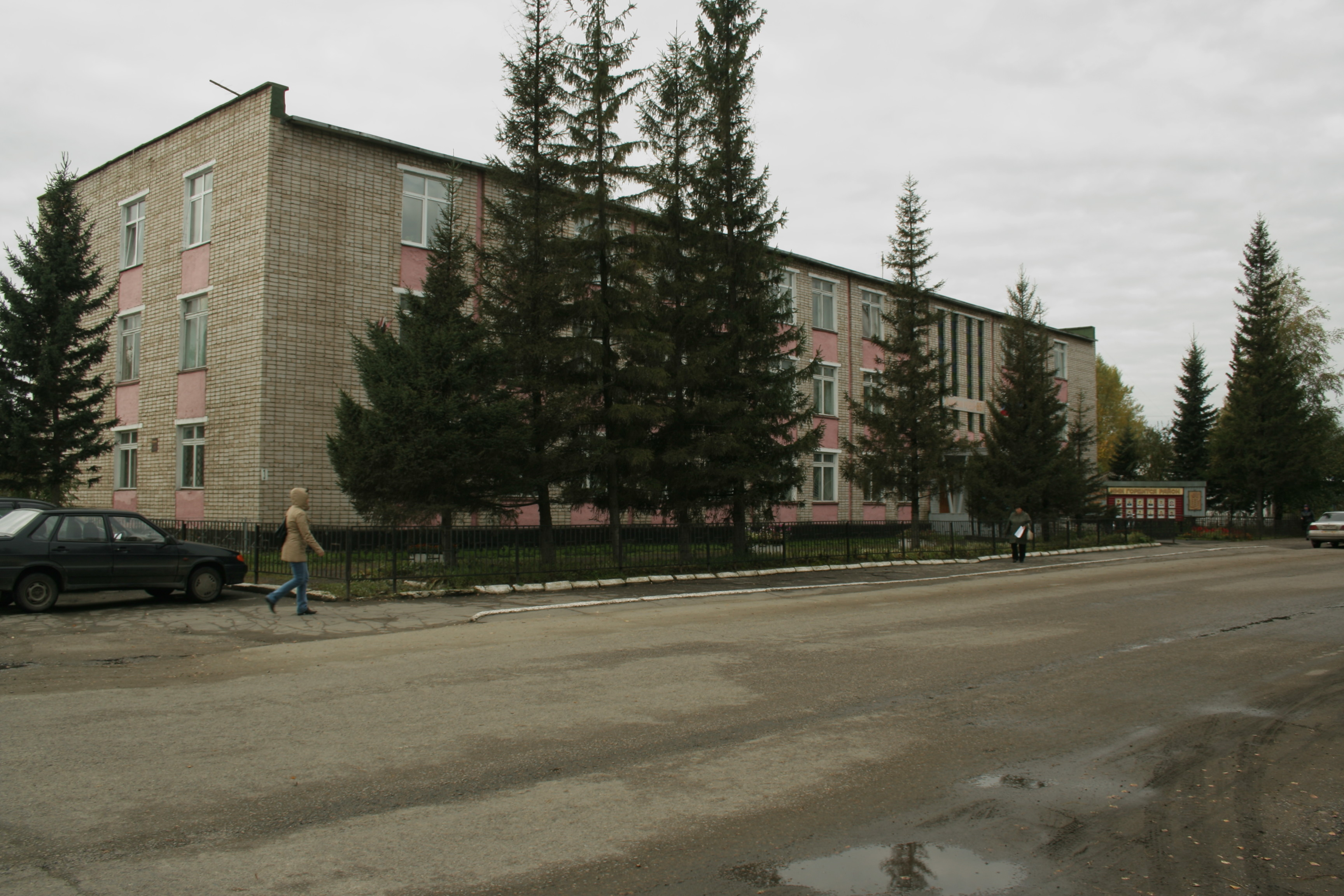 Здание органов власти Быстроистокского района Алтайского края в с. Быстрый исток